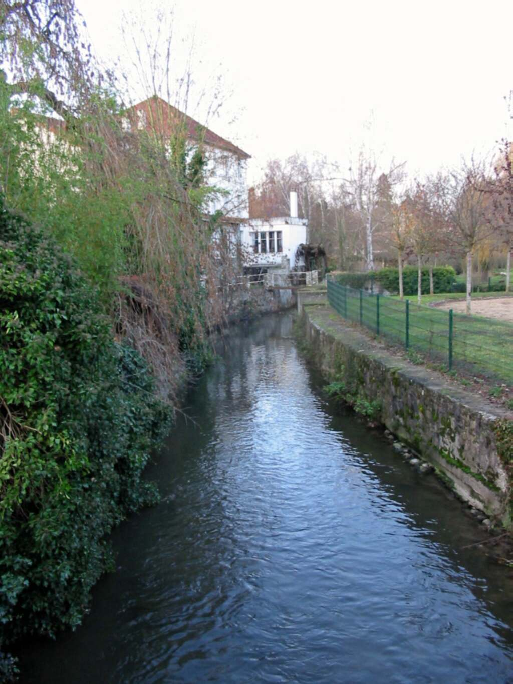 Un bras de la Mauldre à Maule (on aperçoit au fond la roue d'un ancien moulin) Photo JH Mora ; janvier 2005 Catégorie:Image de Maule Catégorie:Image de la Mauldre